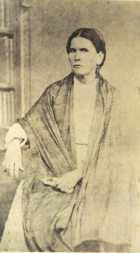 Portrait of Marcos Pérez